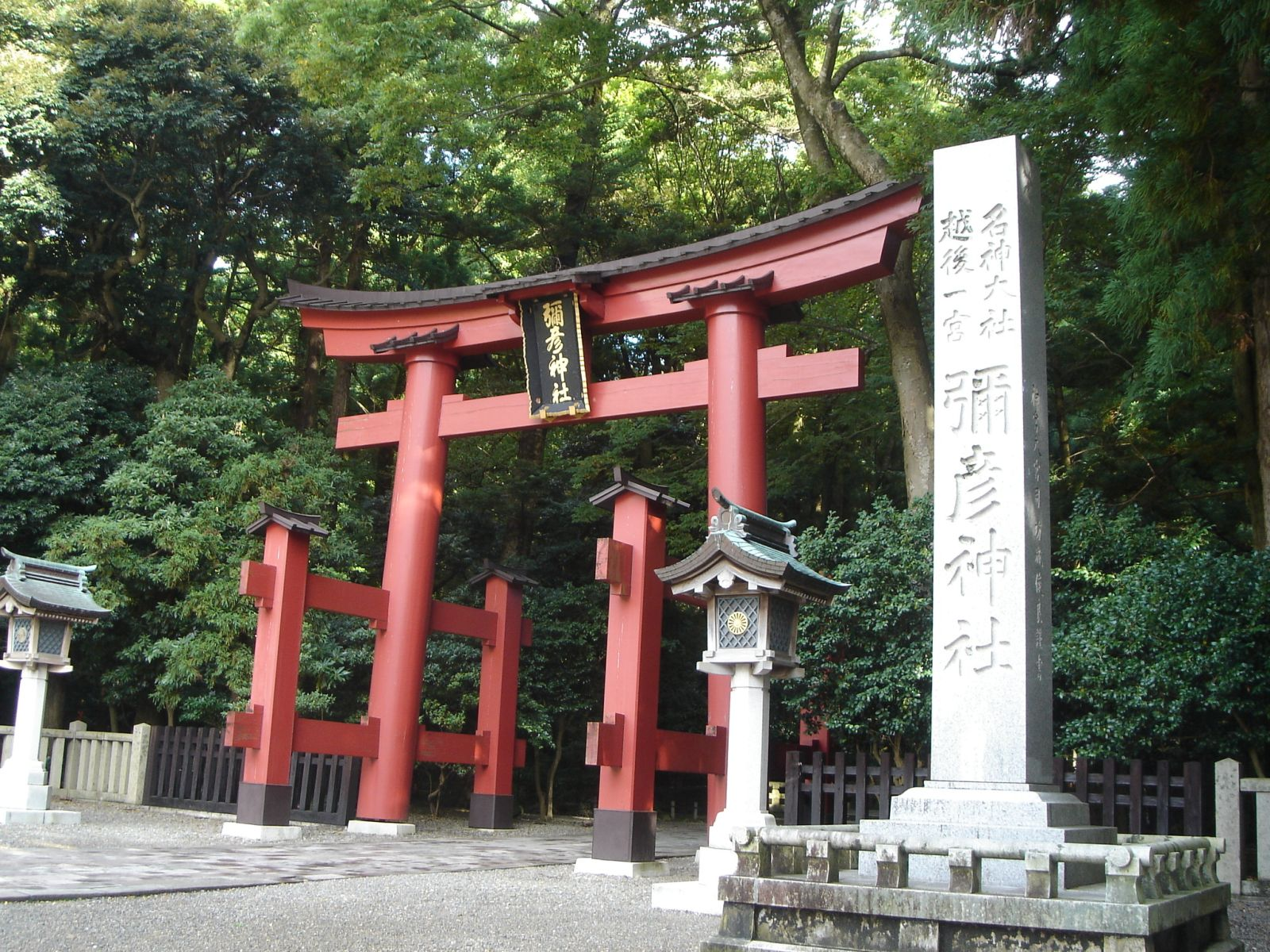 弥彦神社鳥居、新潟県弥彦村